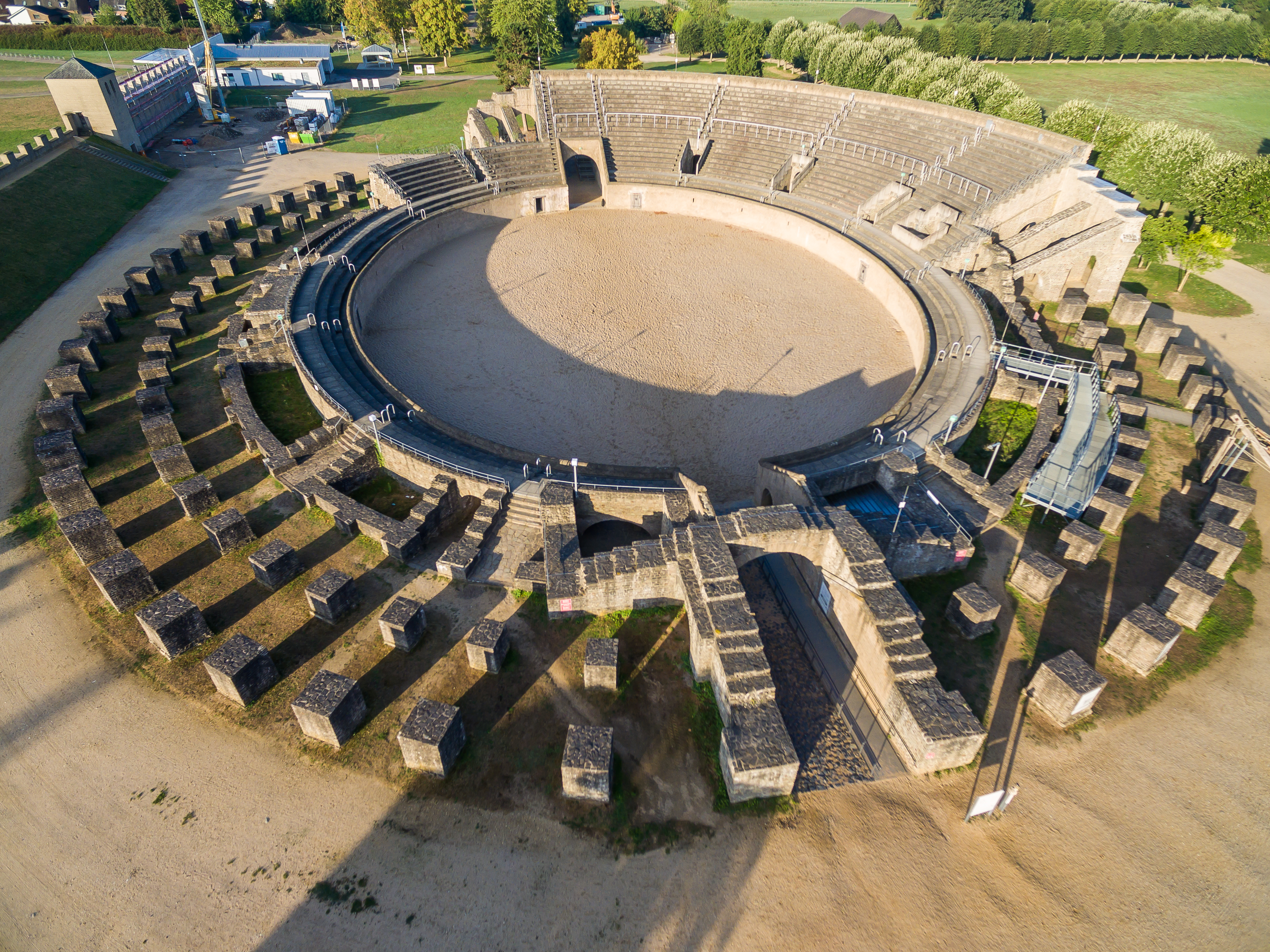 Colonia Ulpia Traiana.. LVR-Archäologischer Park Xanten. Luftaufnahme mit einem Quadkopter